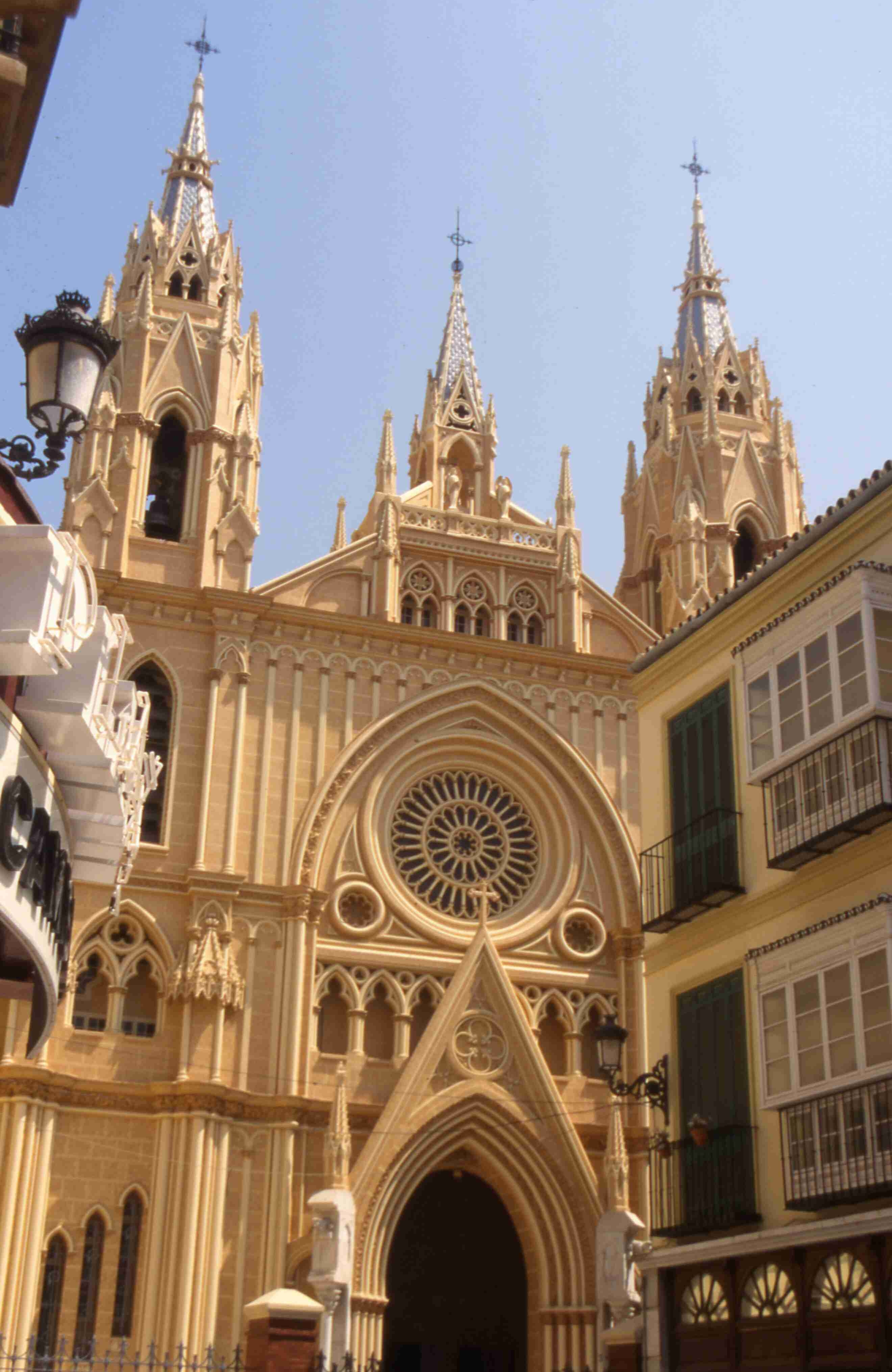 Malga Kirche